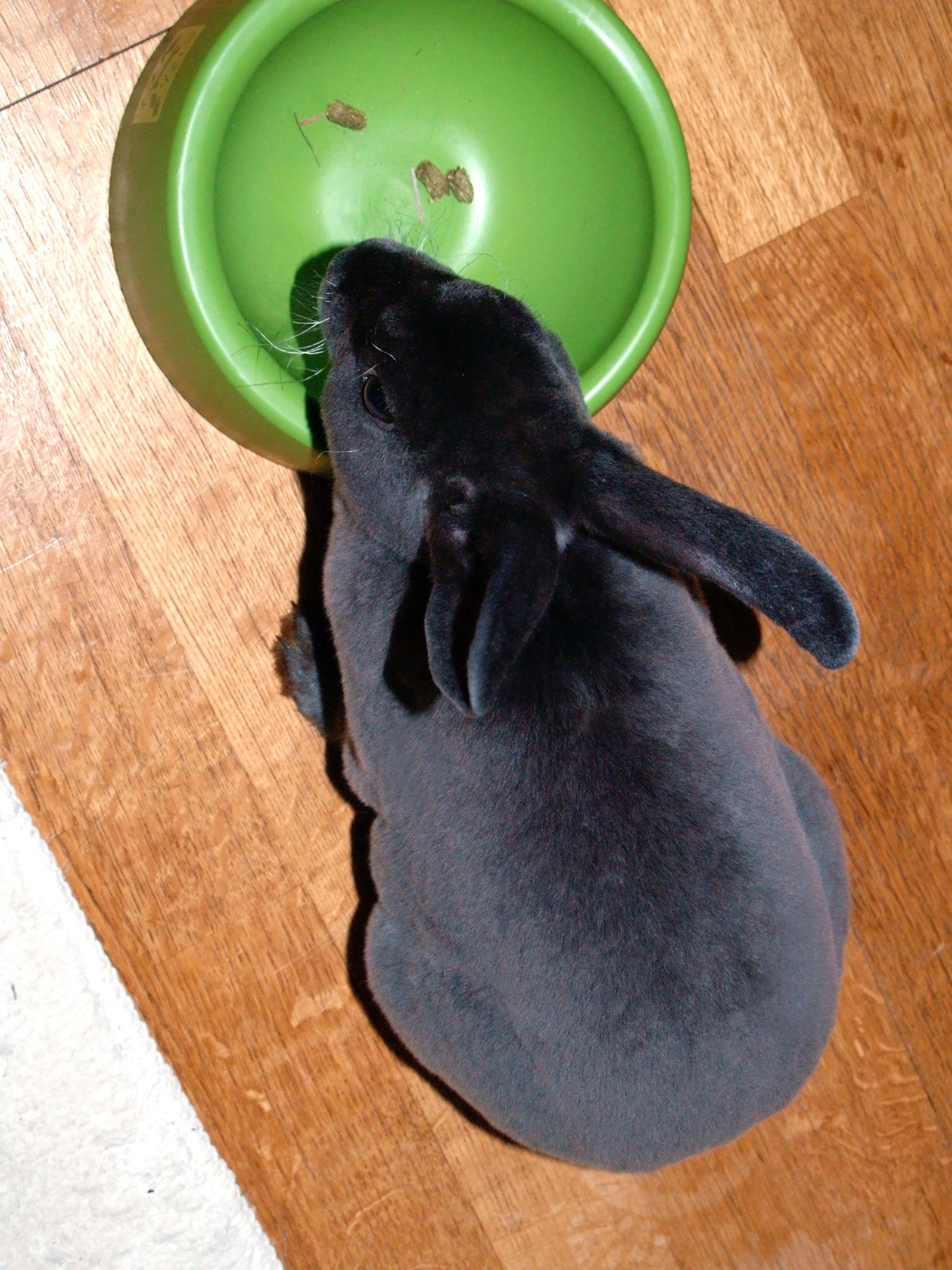 ペットのミニレッキスへの餌付けを上から撮影。撮影場所は自宅。